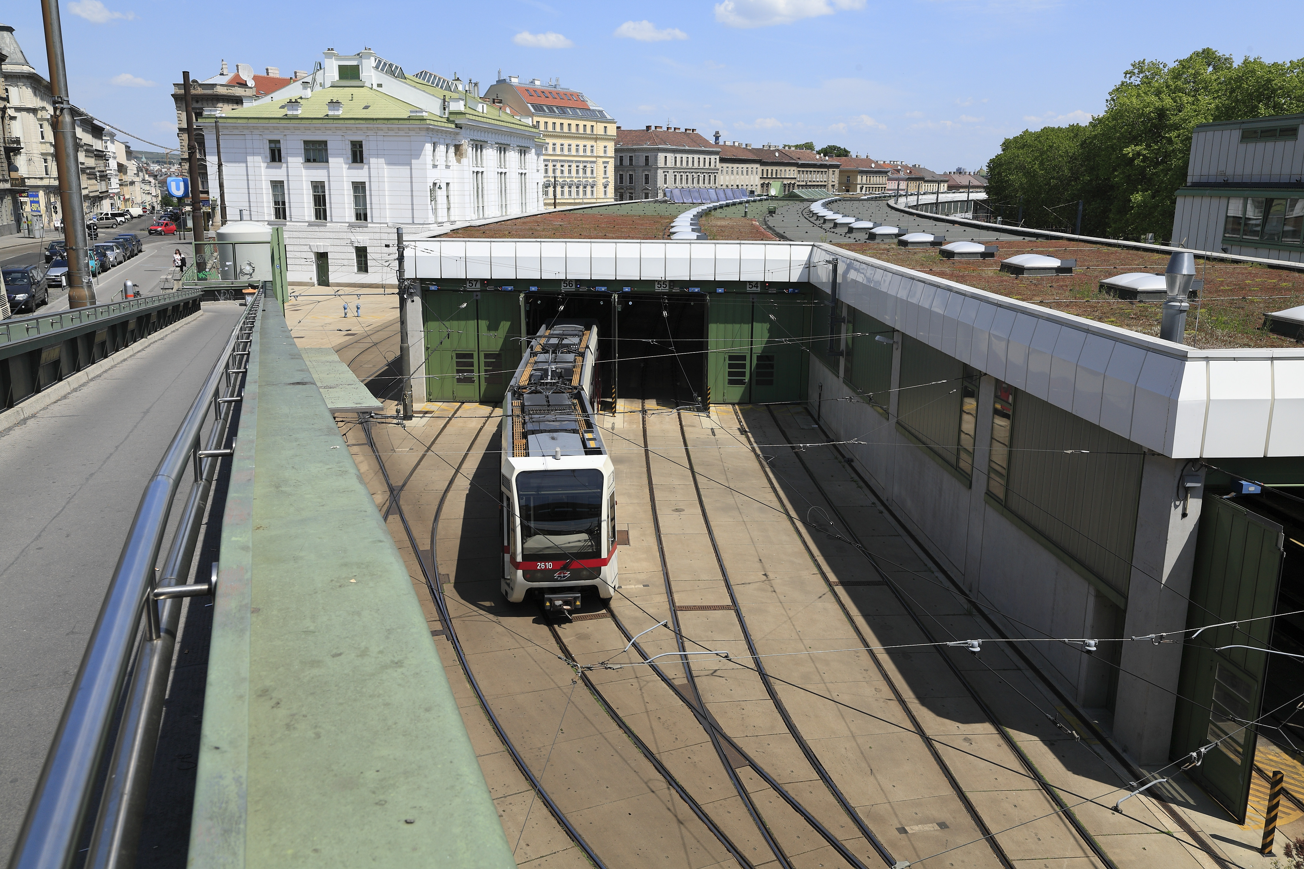 Abstell- und Wartungshalle von der Zugangsbrücke zum Bahnsteig. Die Dimensionen der Halle haben sich kaum verändert, die Bauweise dagegen schon. Im Bw-Bereich liegt praktisch durchgehend eingedeckter Rillenschienenoberbau.Von außen sind die Führerstandsenden an einer weiter heruntergezogenen dunklen Fläche zu erkennen, die auch die runden Lampen umfasst. Am B-Ende gibt es eckige Lampenkombinationen. Nur am Führerstände gibt es die zusätzlichen Einstiege für den Triebwagenführer.